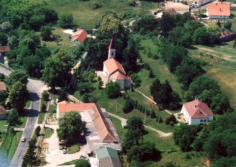 Dióskál, Hungary, aerial photography. Szent István király római katolikus templom